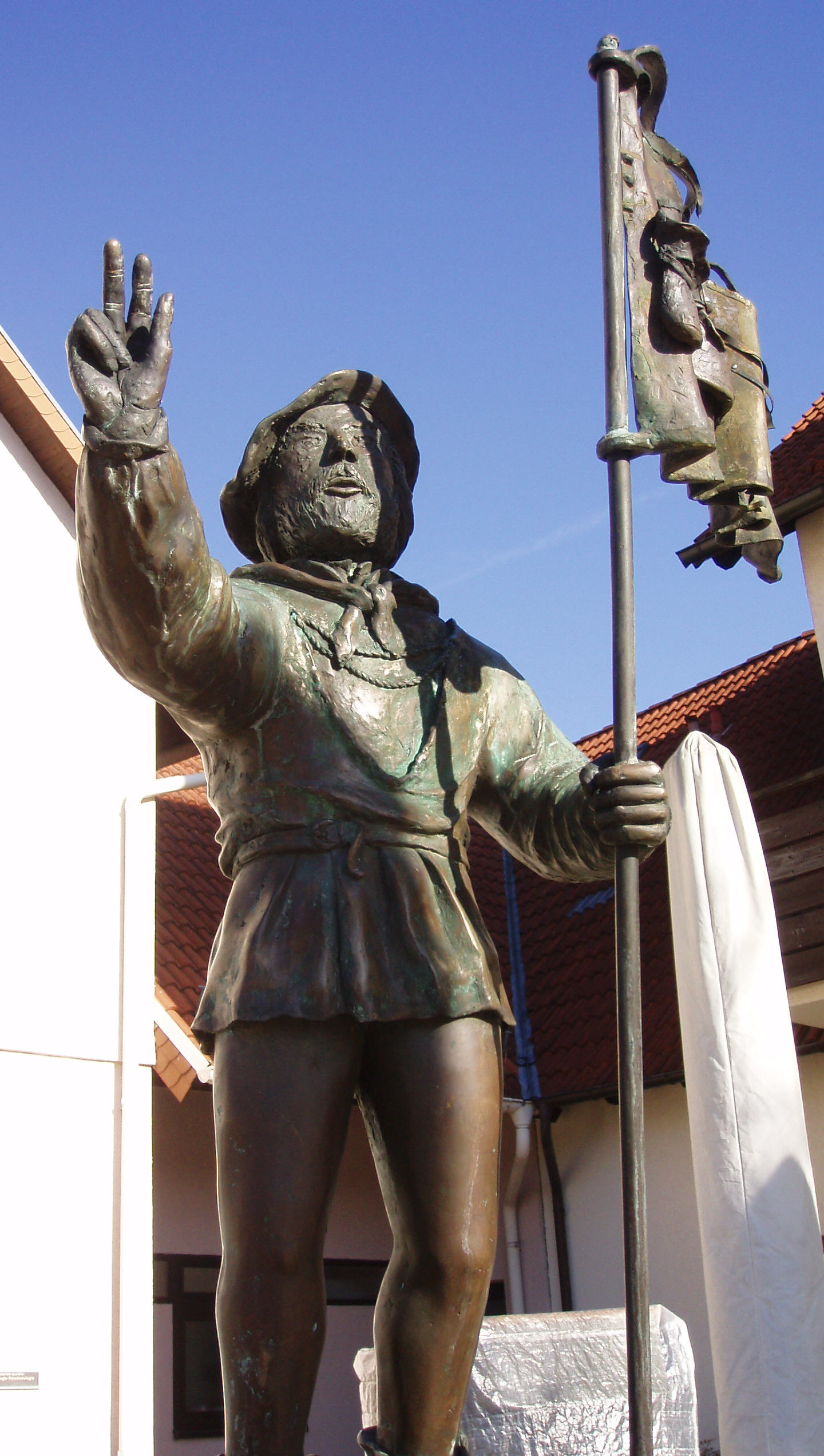 Brunnenfigur im Ortskern von Untergrombach